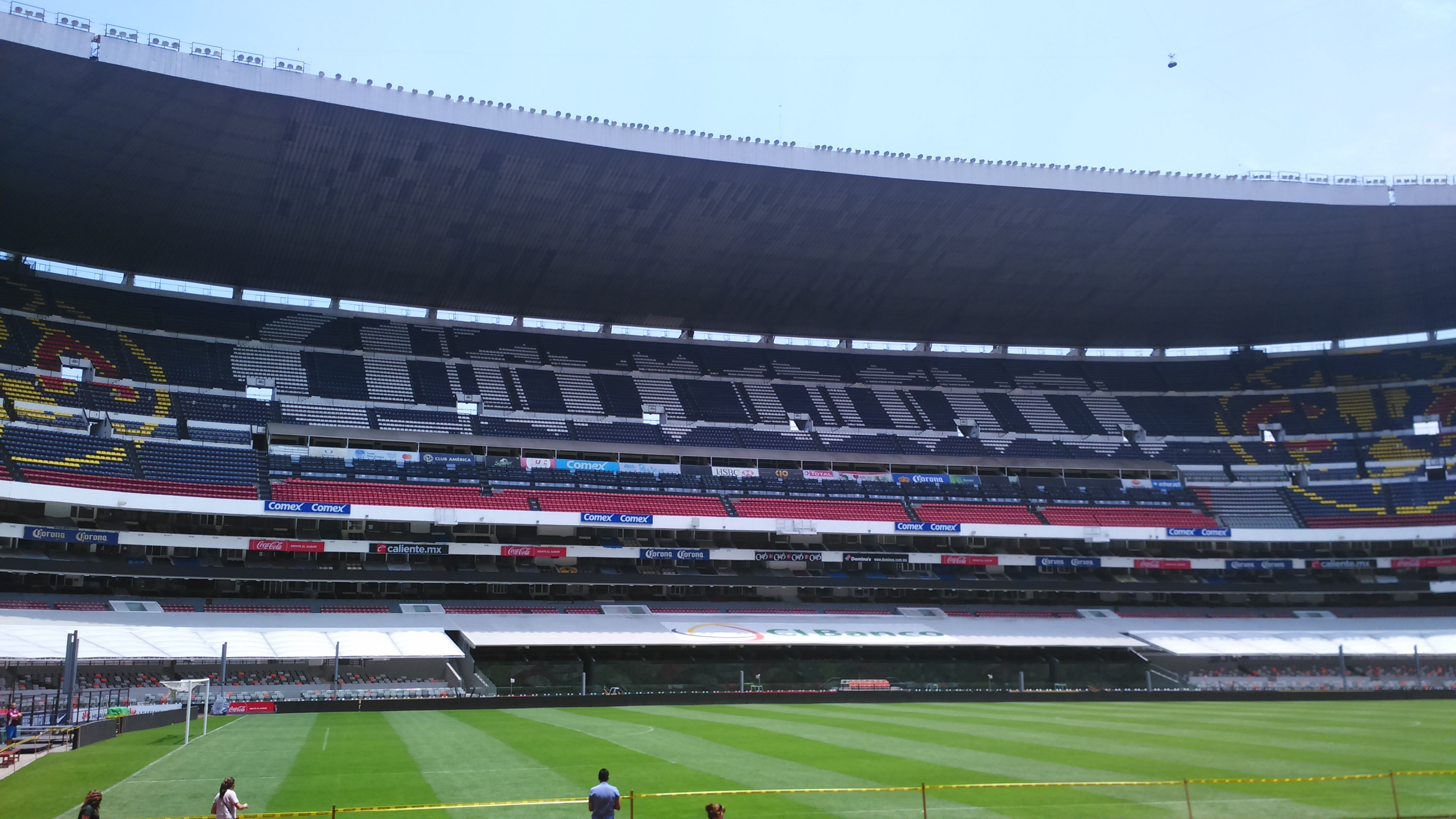 Panorama de la tribuna lateral